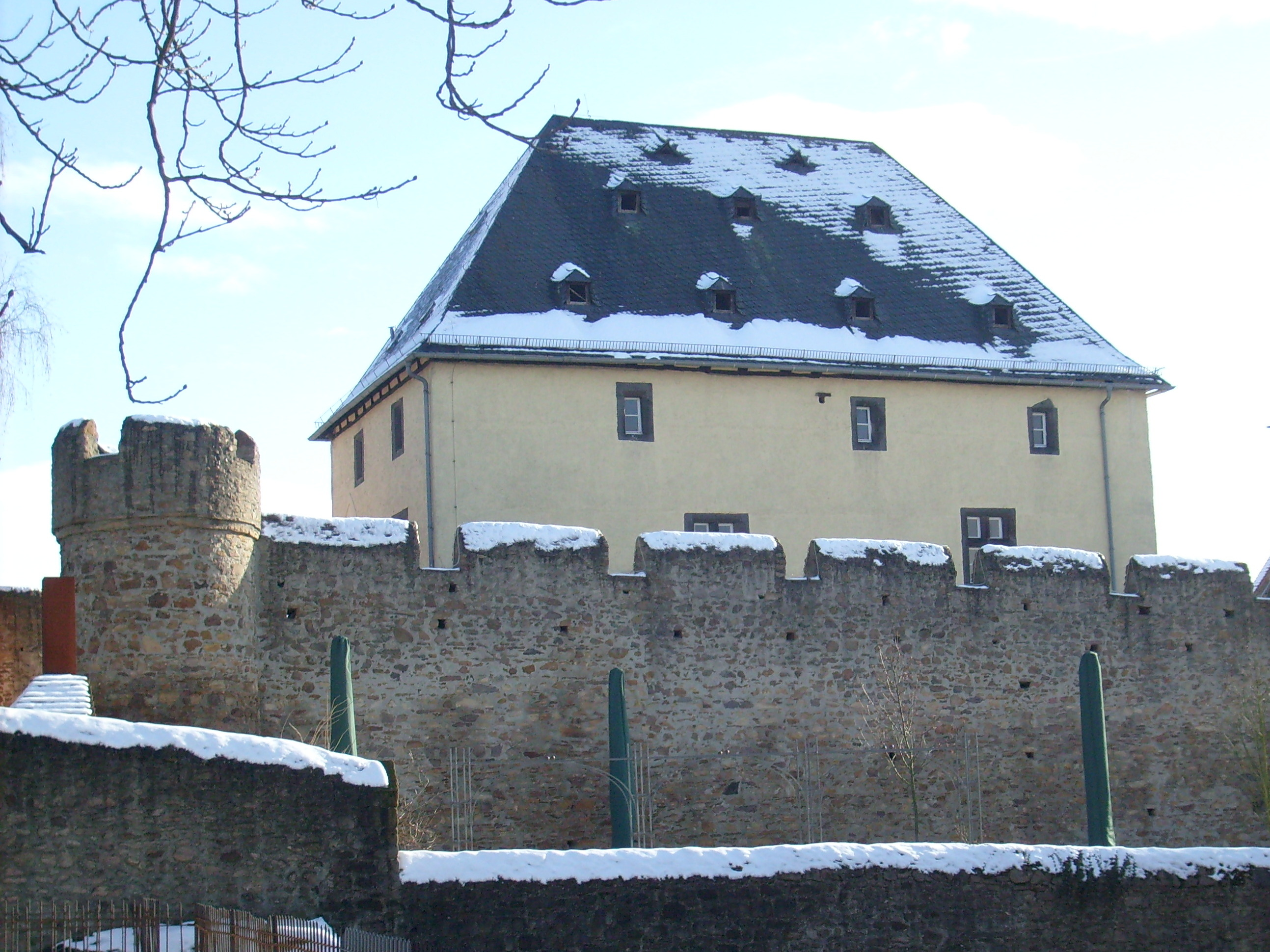 Burg Rockenberg (fotografiert aus Richtung Nordwest)